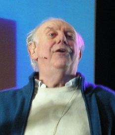 Nobel Prize winner Dario Fo in Milan.